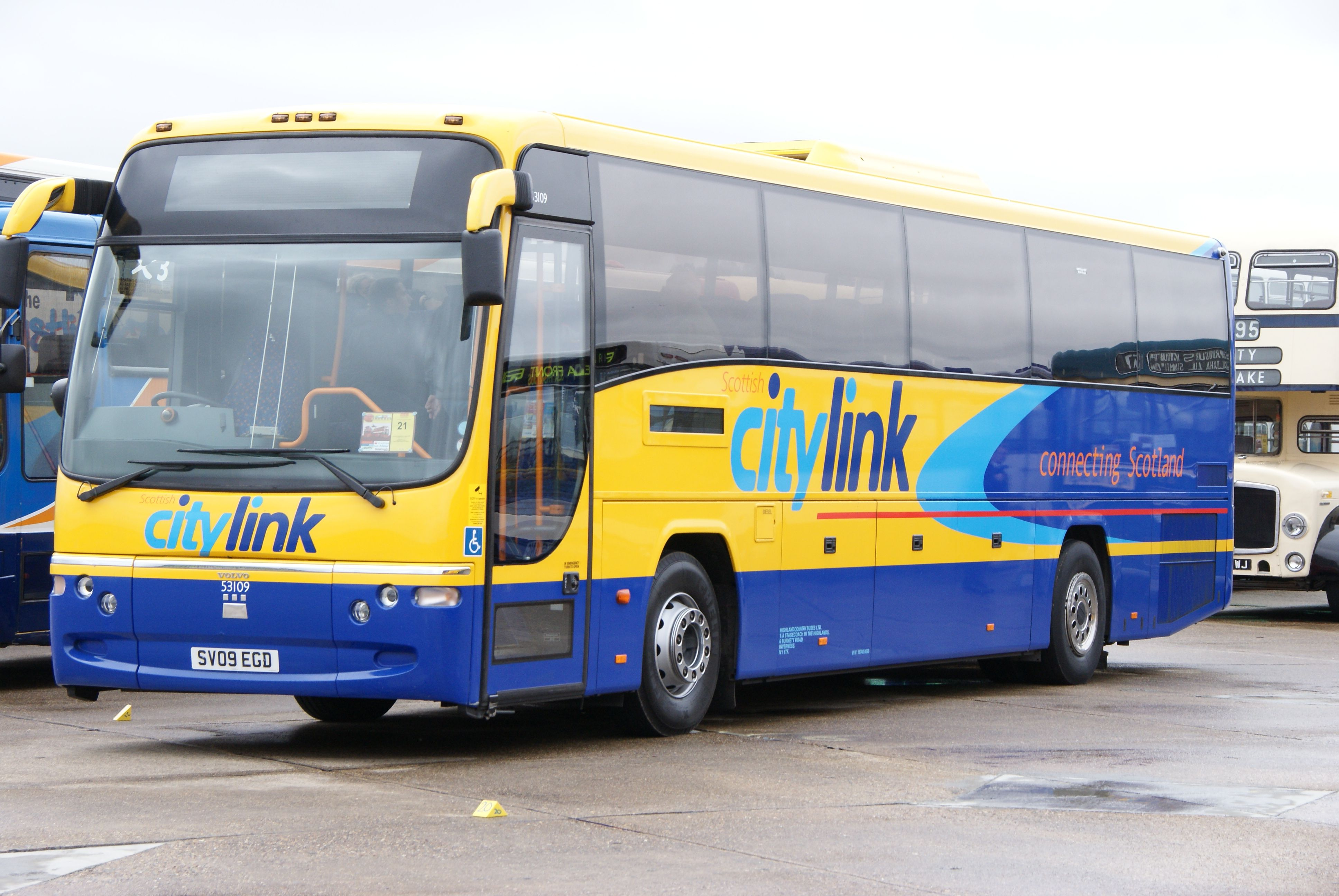 SV09EGD 260910 CPS